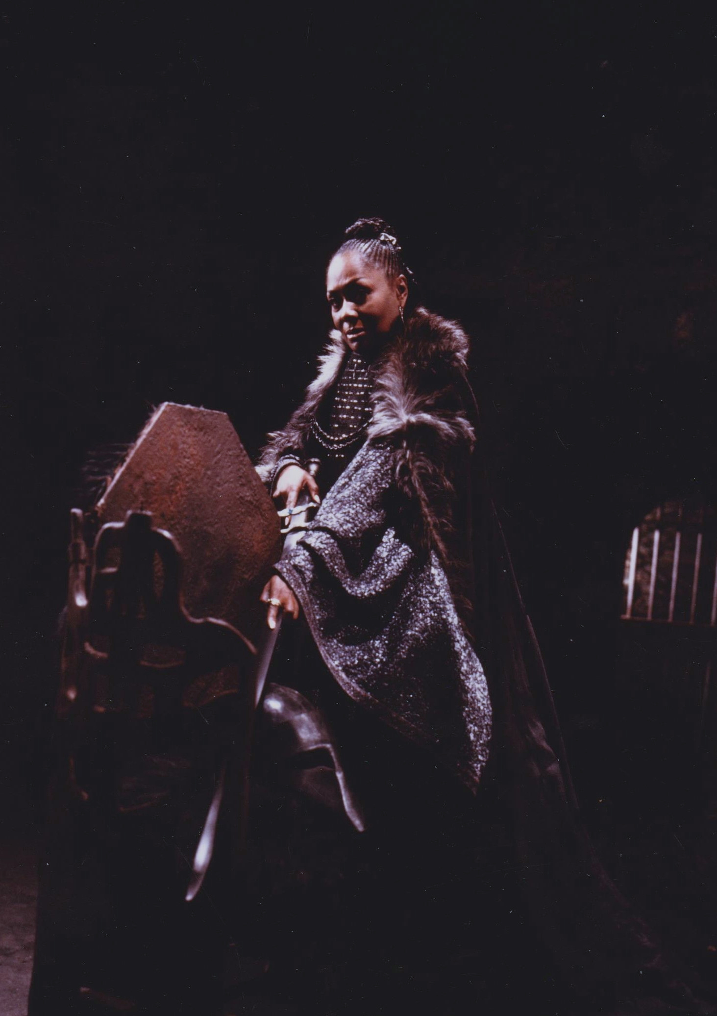 Lady Macbeth chante ici l'air "La luce langue" où elle invite son époux à s'enfoncer dans le crime.